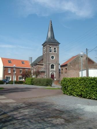 Eglise de Chemy. Située sur le place du village Photo prise le 25/04/06